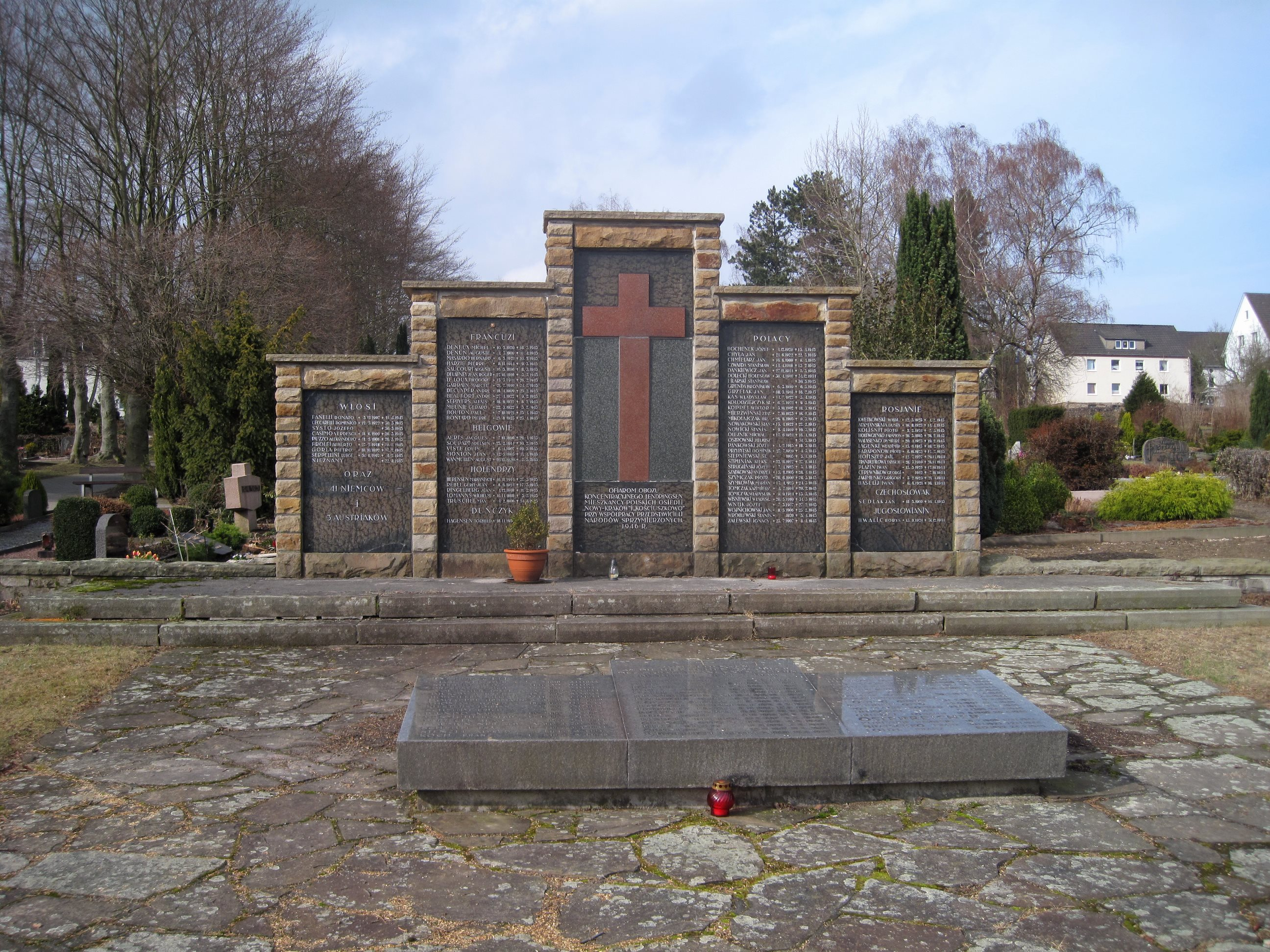 Ehrengrabstätte für die Opfer aus dem Strafgefangenenlager West im Biebertal auf dem Friedhof in Menden-Lendringsen.